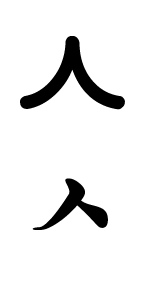 Korean Alphabet ㅅ(si.ot)